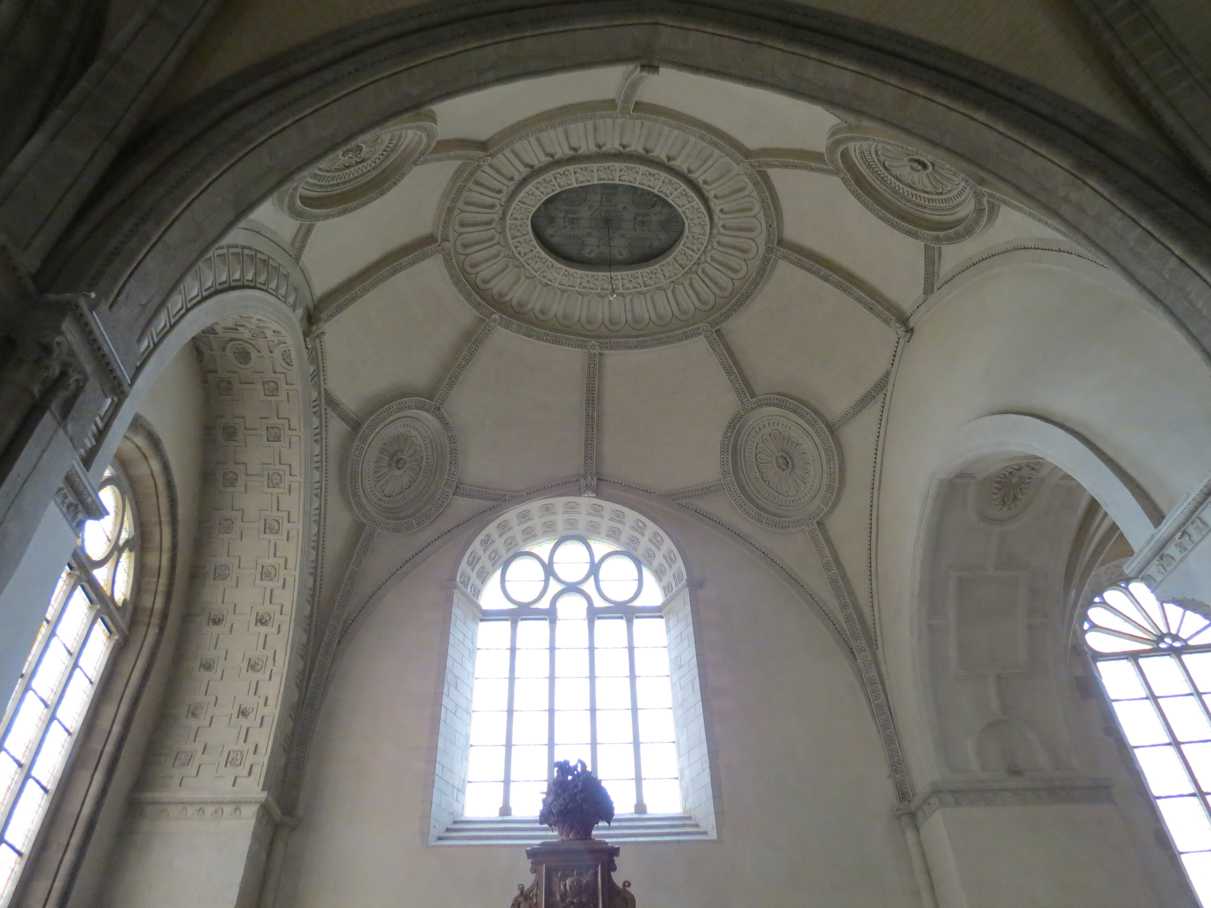 Voûtes du transept nord de la cathédrale de la Sainte-Trinité de Laval, Mayenne, Pays de la Loire.